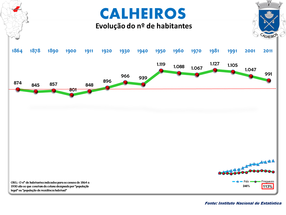 Censos 1864/2011